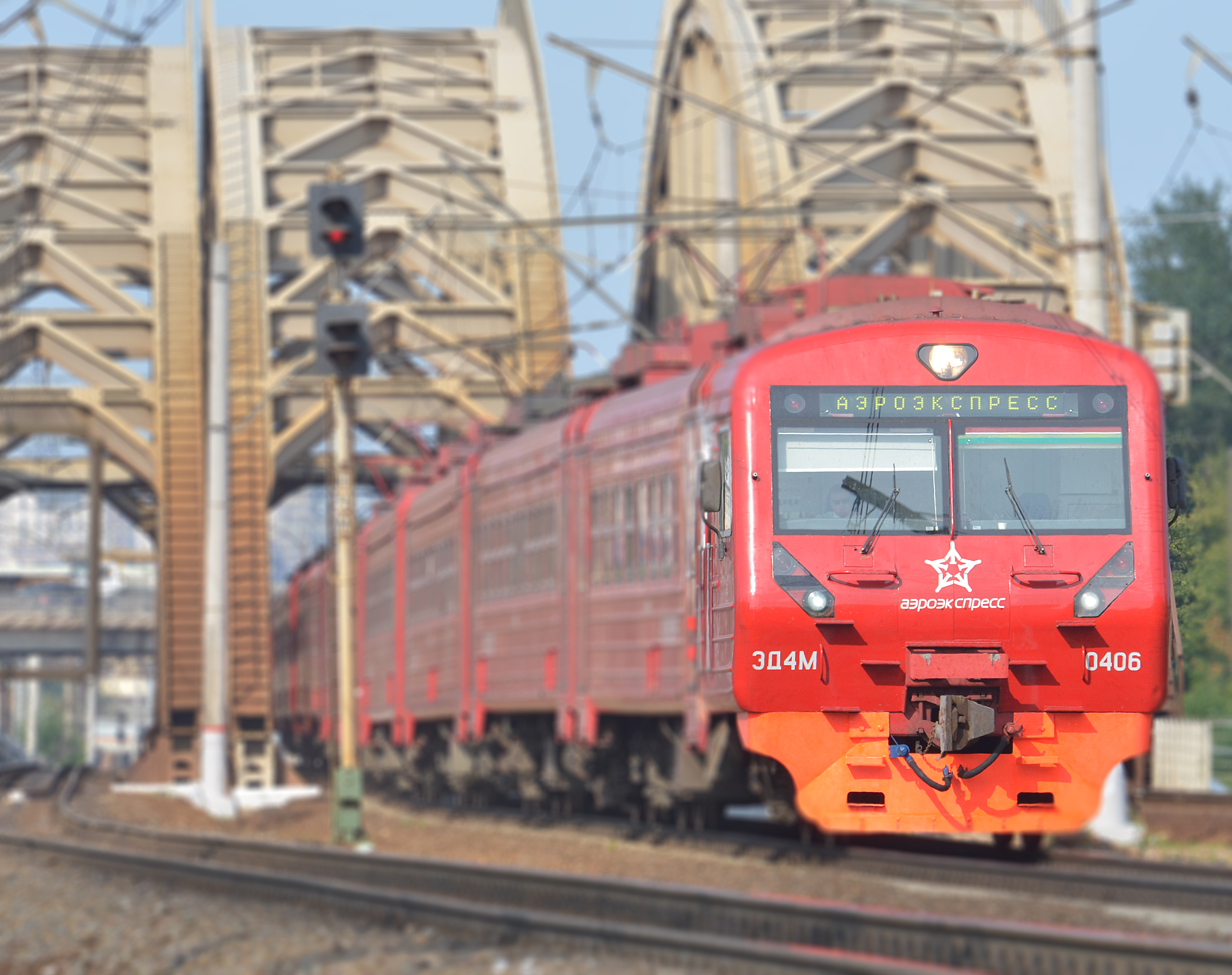 Можно увидеть здесь : You can see here